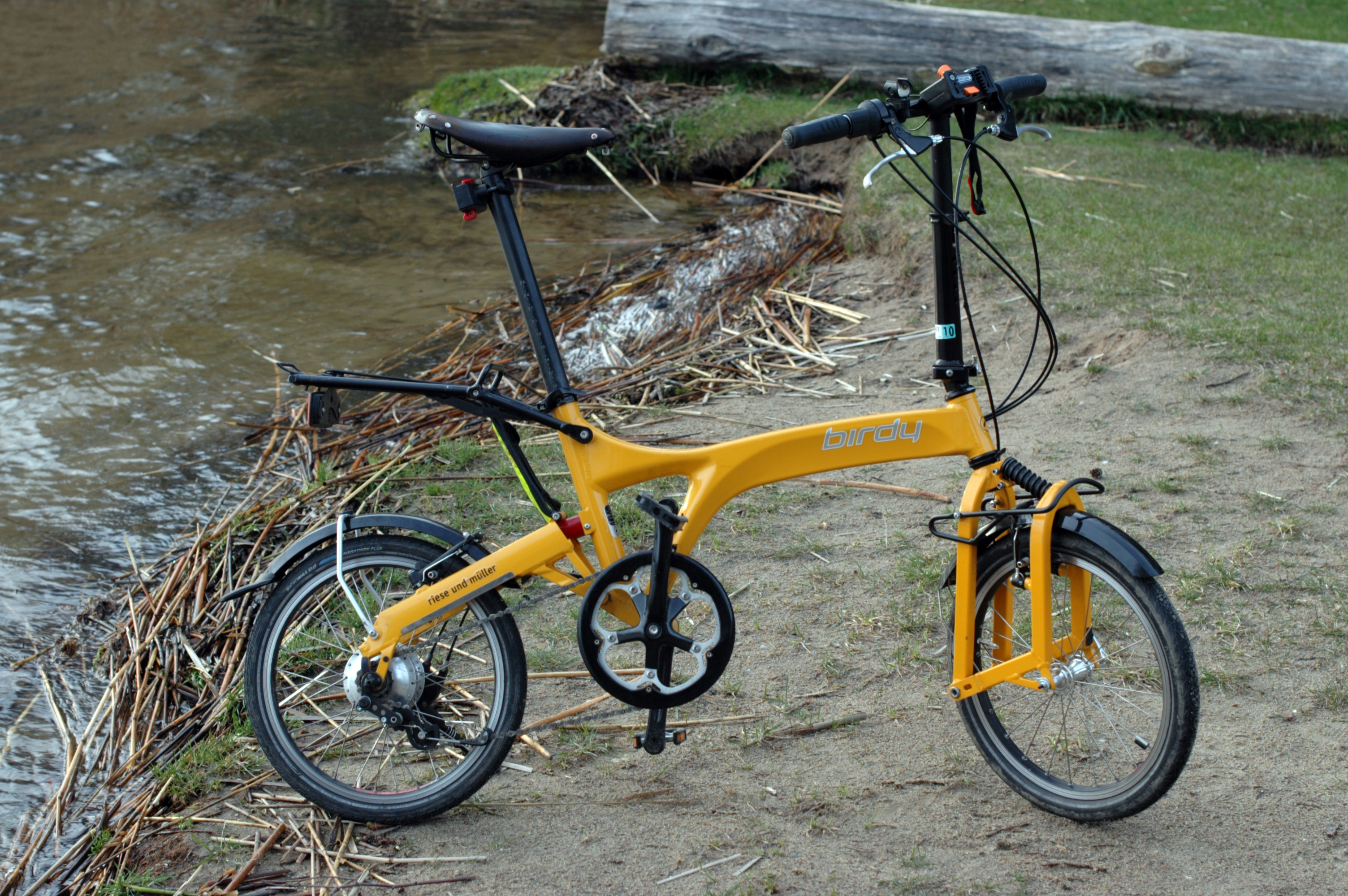 Faltrad "Birdy" des Herstellers Riese und Müller